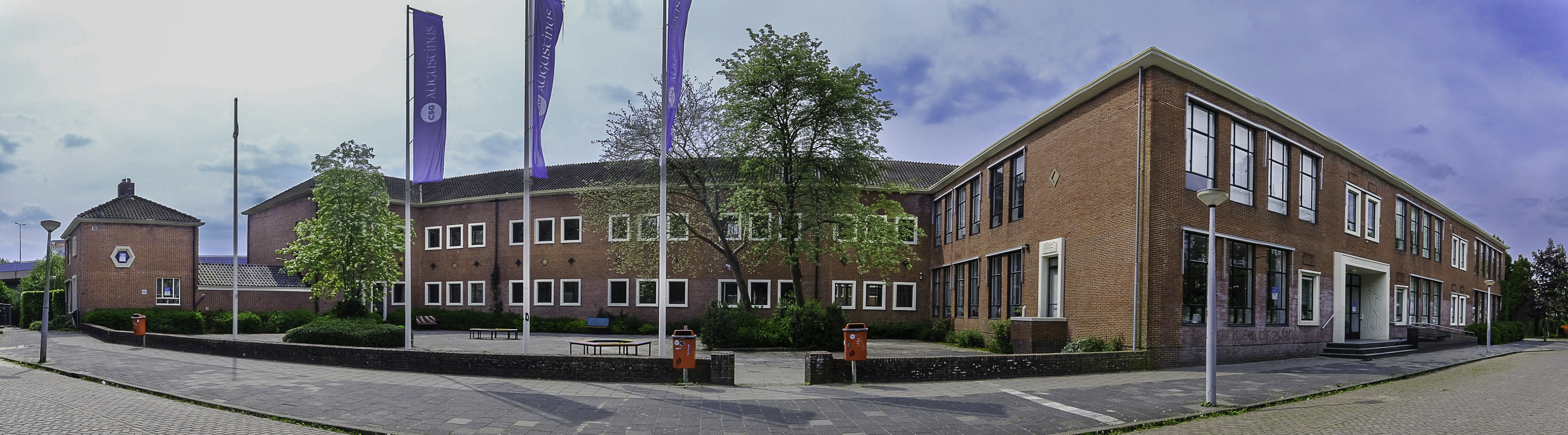 Augustinuscollege aan de Admiraal de Ruyterlaan 37-39 in Groningen.